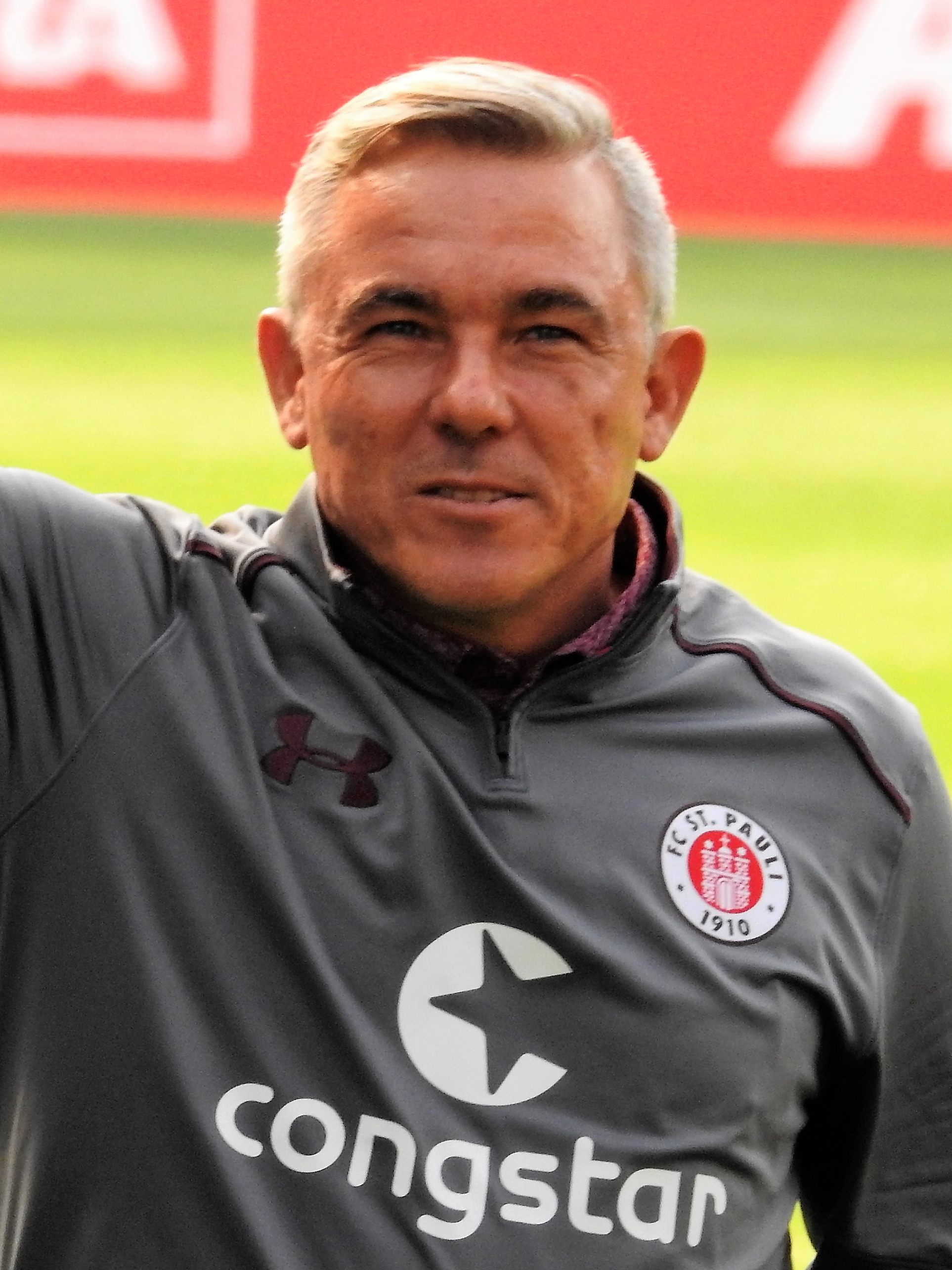 Janssen, Olaf Trainer FCSP